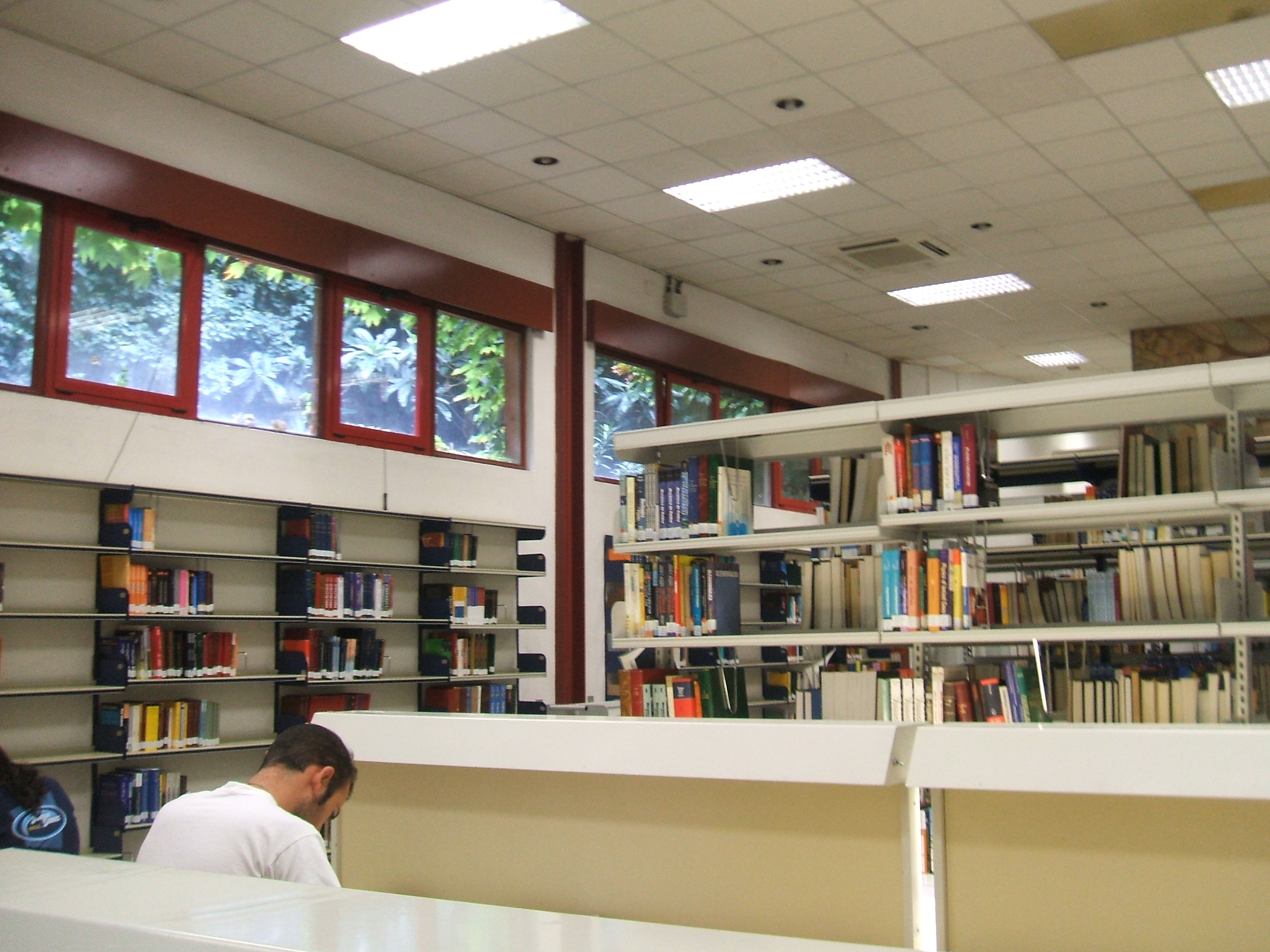 Imagen de la biblioteca de la Facultad de Ciencias de la Universidad de Granada.